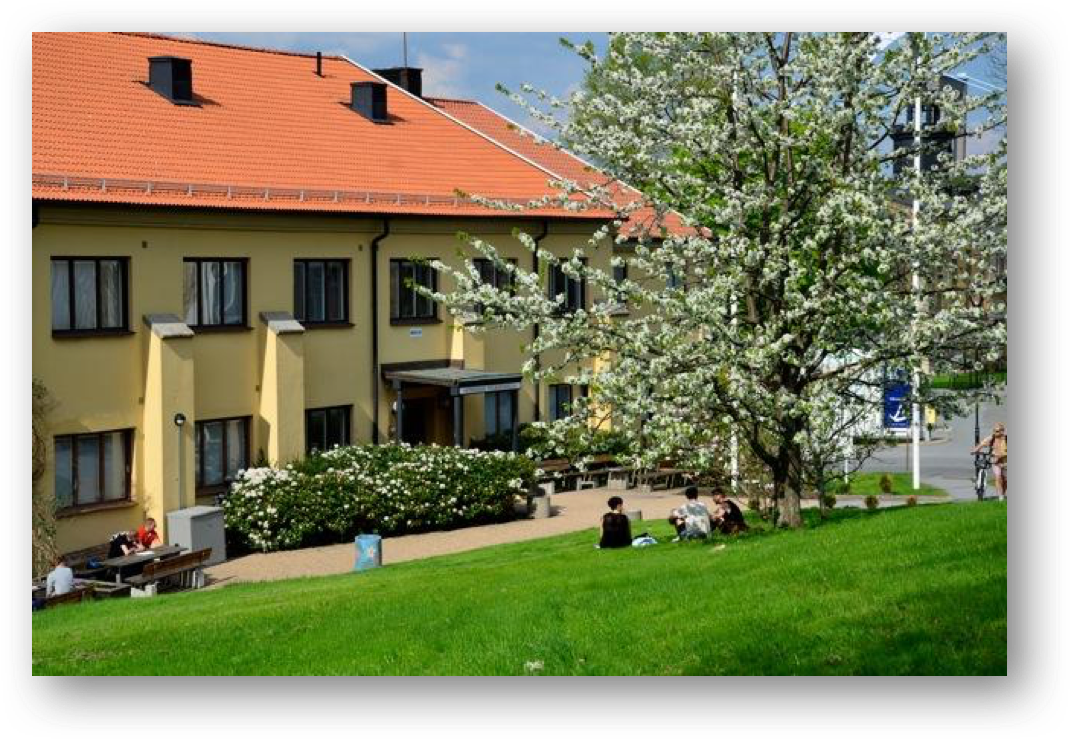 Göteborgs folkhögskola Nya Varvet